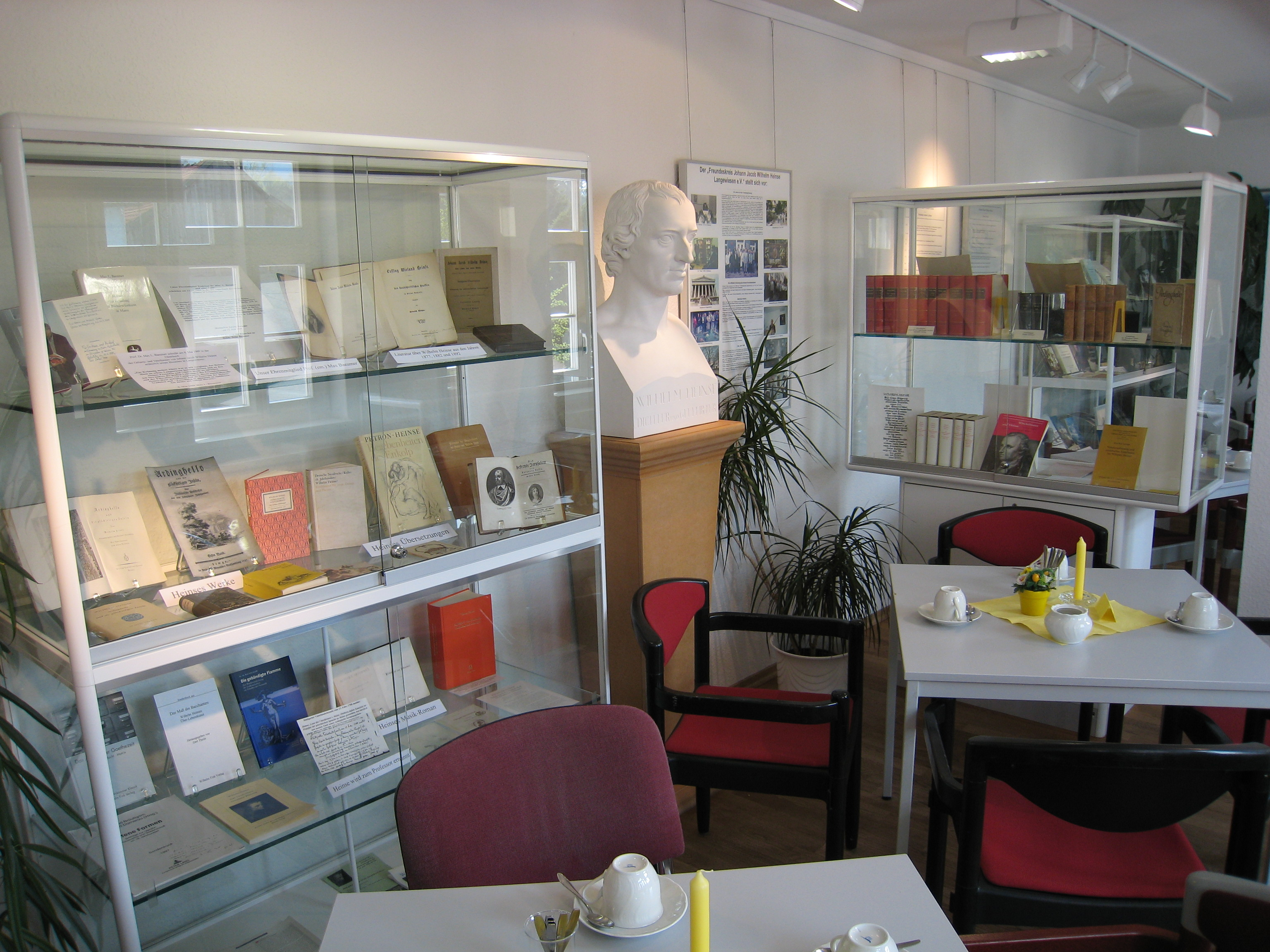 Die Ausstellung über Wilhelm Heinse in seinem Geburtshaus in Langewiesen.